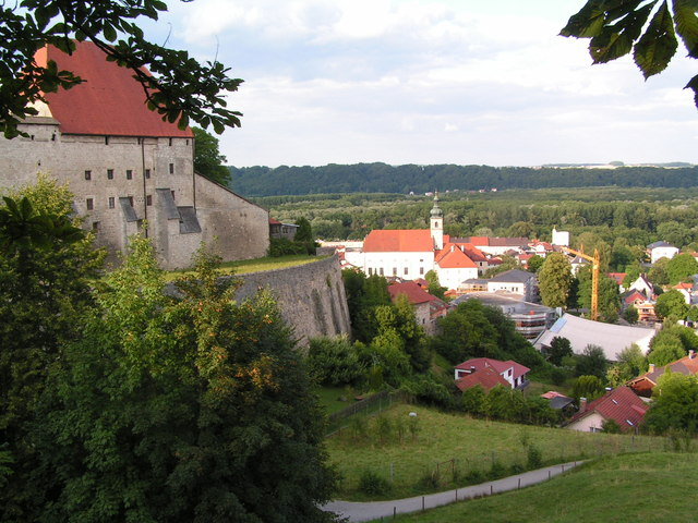 Blick auf Tittmoning